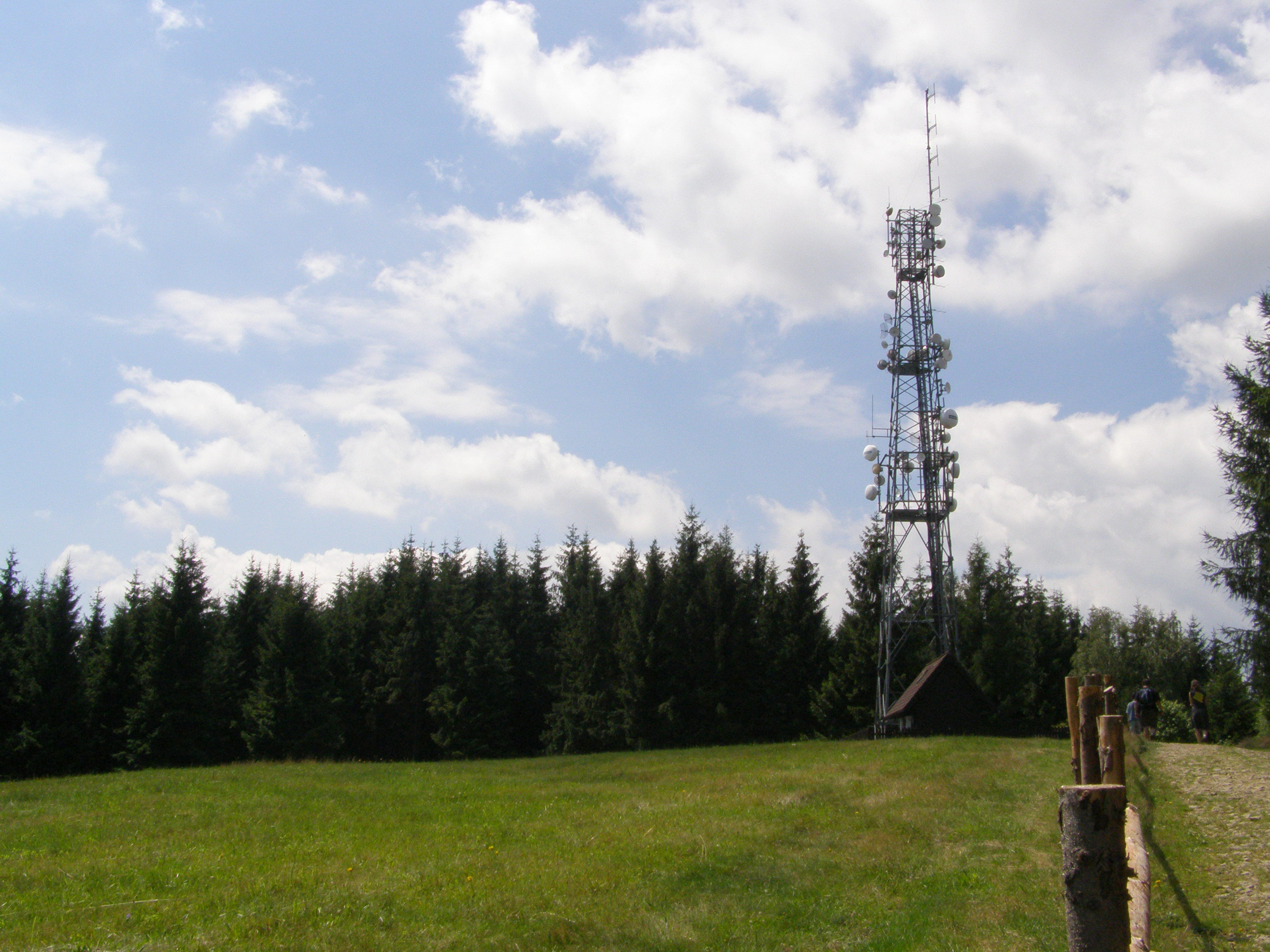 Palkovické hůrky, nejvyšší vrchol Kubánkov (661 m)